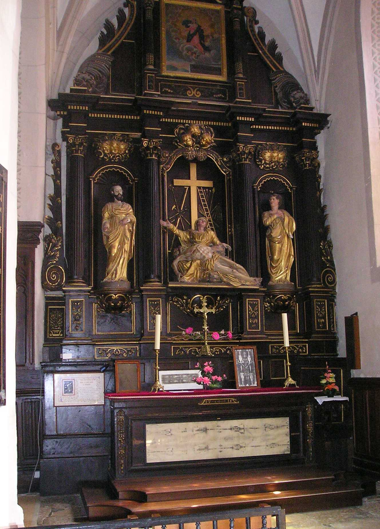 St-Hippolyte (Doubs) Kirche Seitenaltar Turiner Grabtuch